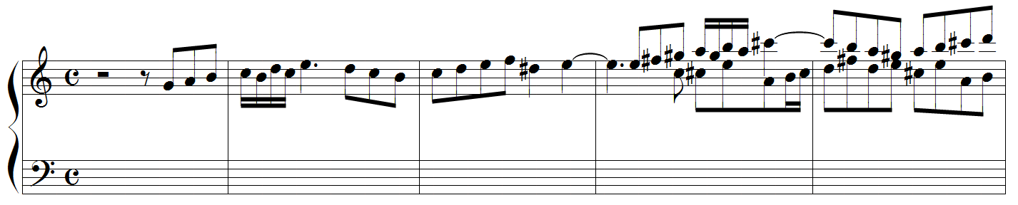 Anton Reicha - sujet de la fugue n°21 des 36 fugues, op.36